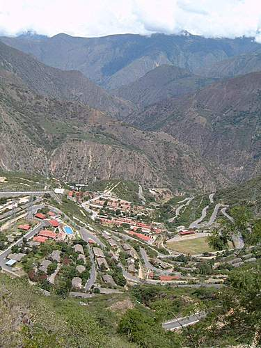 Ninguno